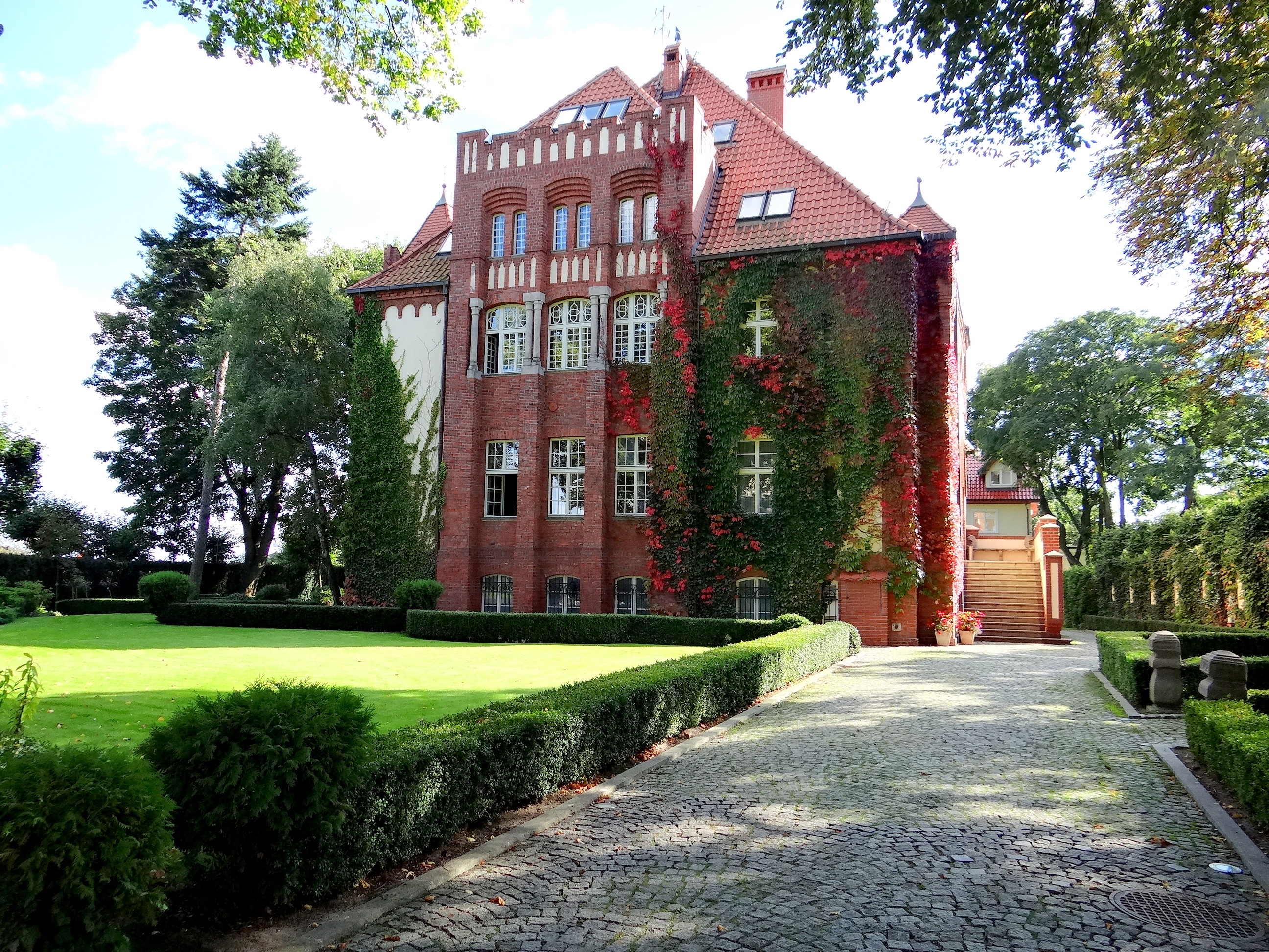 Willa, obecnie przedszkole ul. Chrobrego 48, Sopot